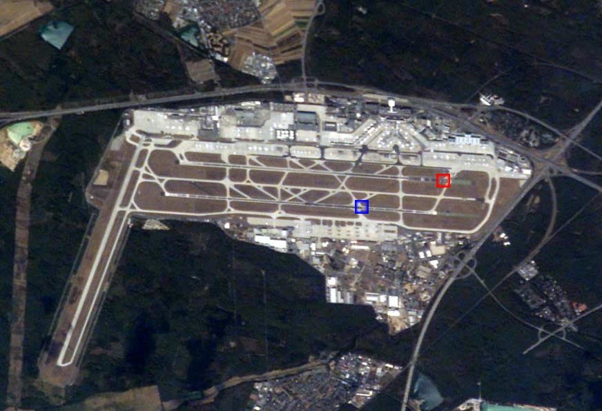 Frankfurt International Airport, satellite view. Image courtesy of Earth Sciences and Image Analysis Laboratory, NASA Johnson Space Center. [1]